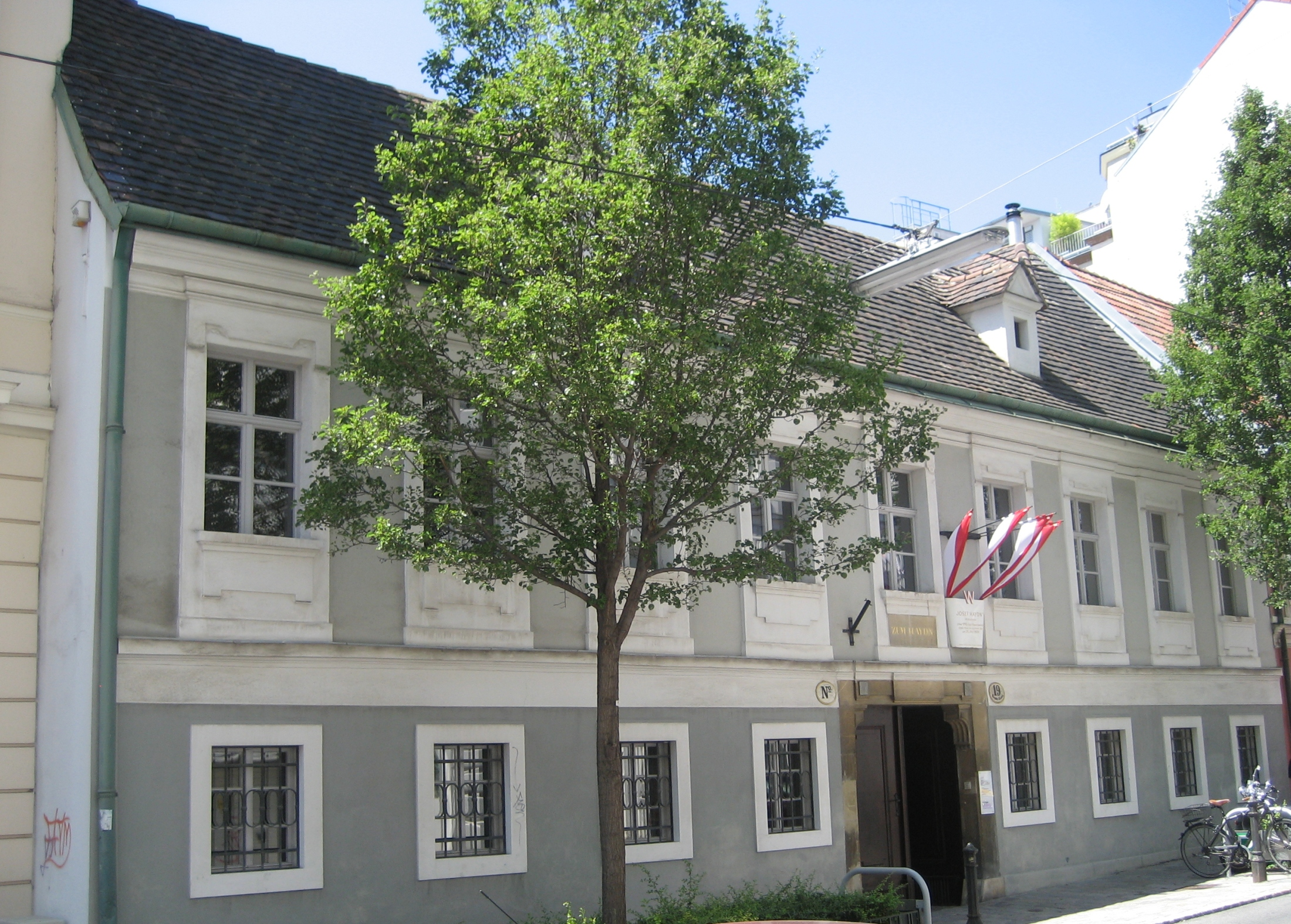 das Haus Haydngasse 19 in Mariahilf, in Wien